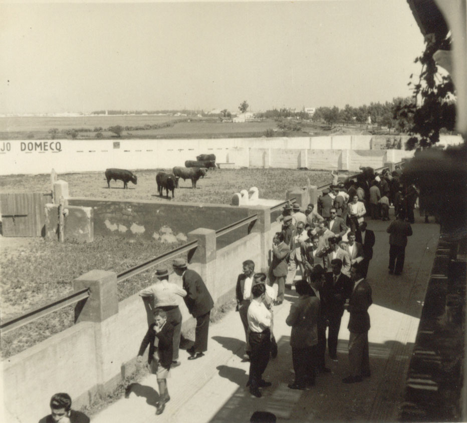 Otra vista de los apartados de toros en la Venta de Antequera durante la Feria de Sevilla de 1955